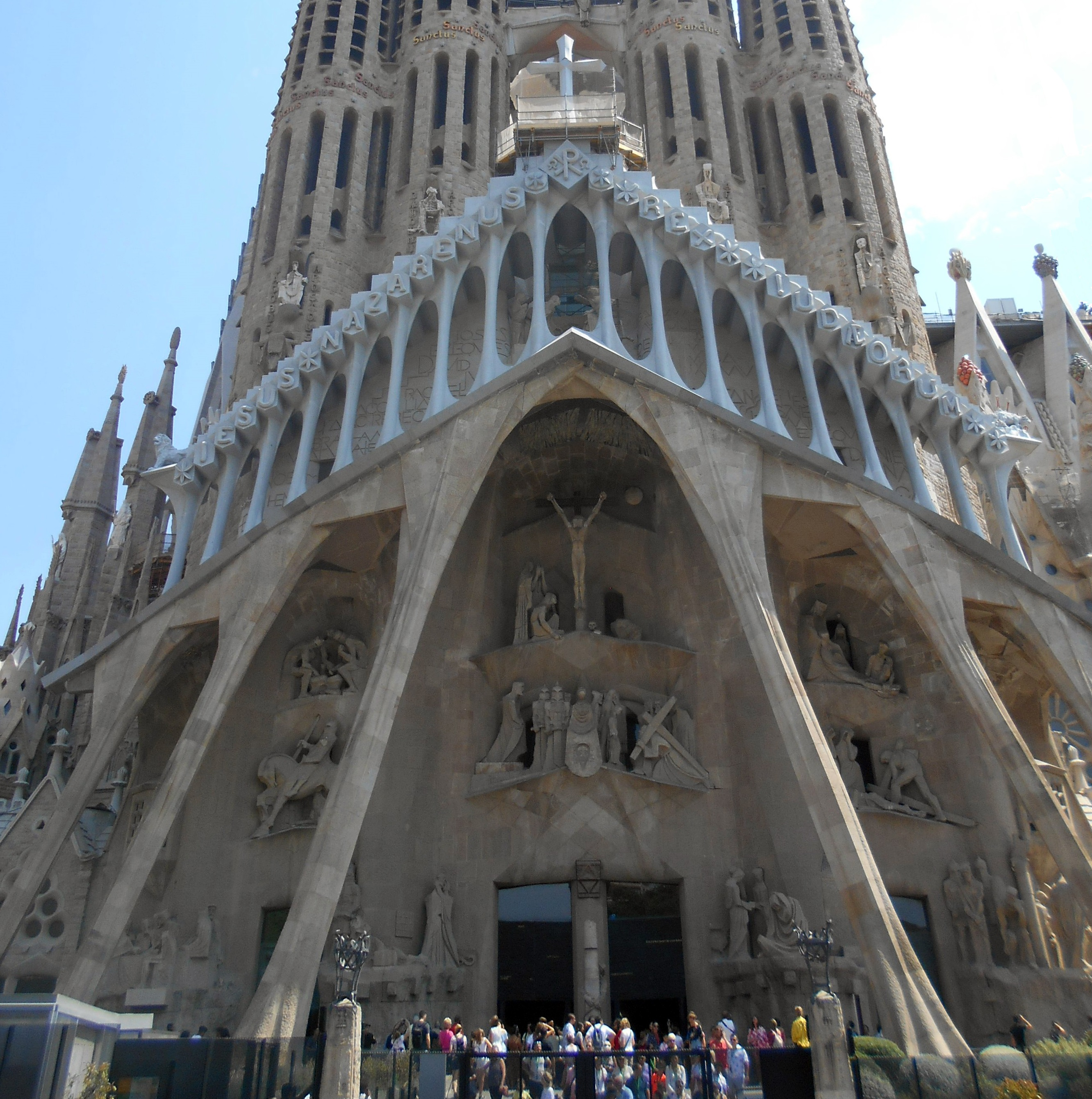 Fachada de la Pasión.